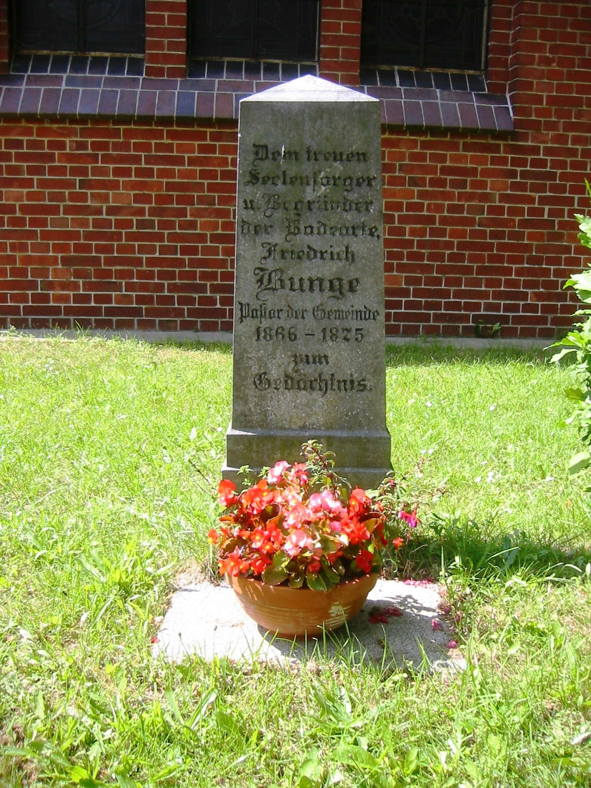 Gedenkstein für Pastor Friedrich Bunge an der Lukaskirche in Graal-Müritz. Bunge war ein Hauptinitiator des Kirchenbaus in Müritz, die dann auf dem Gebiet des damaligen Graals errichtet wurde.